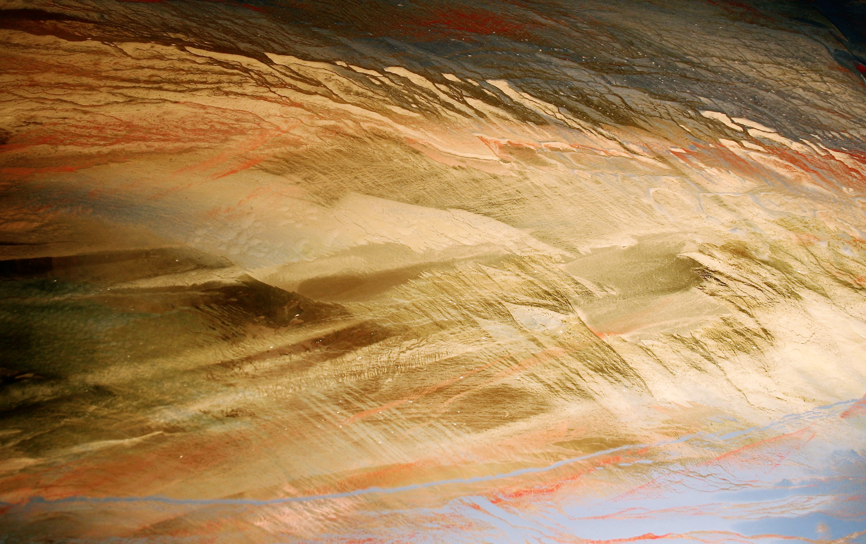 Glas Muster von Cesare Marcotto